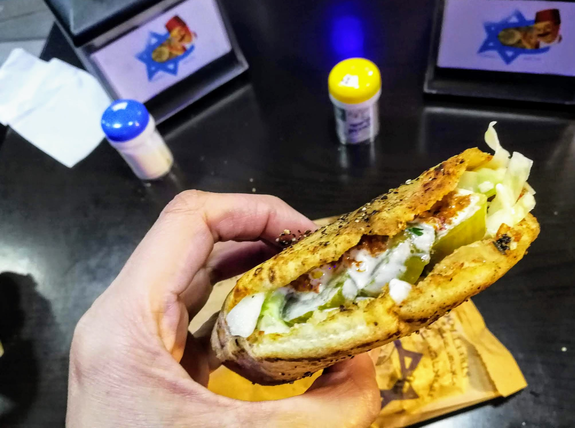 מנה של עראייס בפיתה, תל אביב